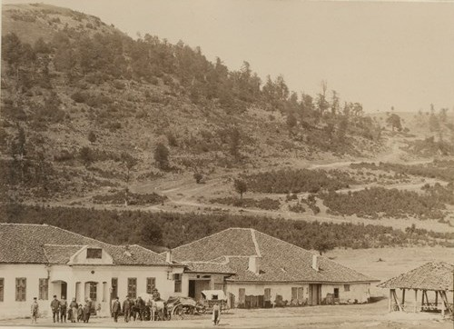 Снимка на пощенската станция на Петрохан